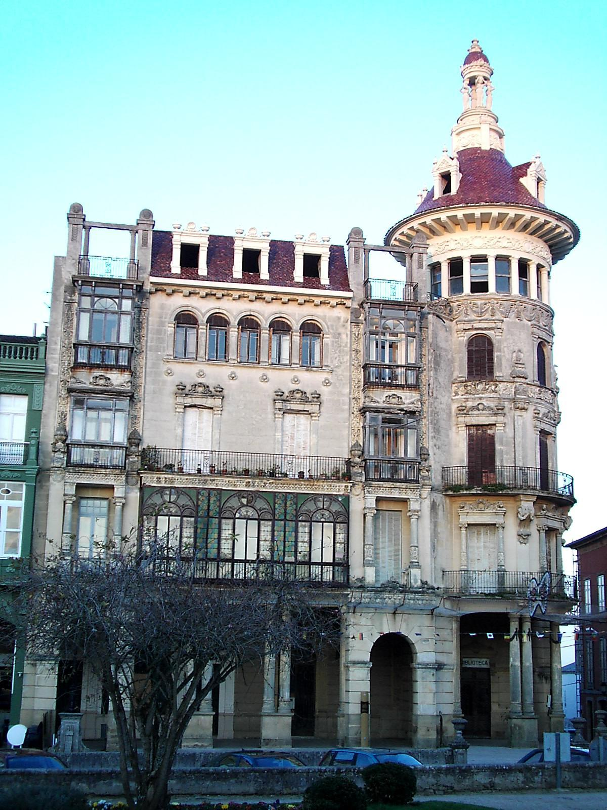 Vista do edificio 'Torre dos Moreno', emblemático de Ribadeo, tomada dende o Parque da Praza de España o 7 de febreiro de 2005 por Antonio Gregorio